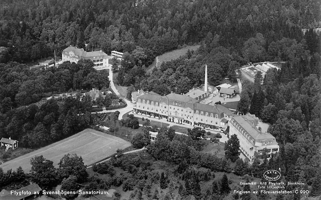 Flygfoto av Svenshögens Sanatorium